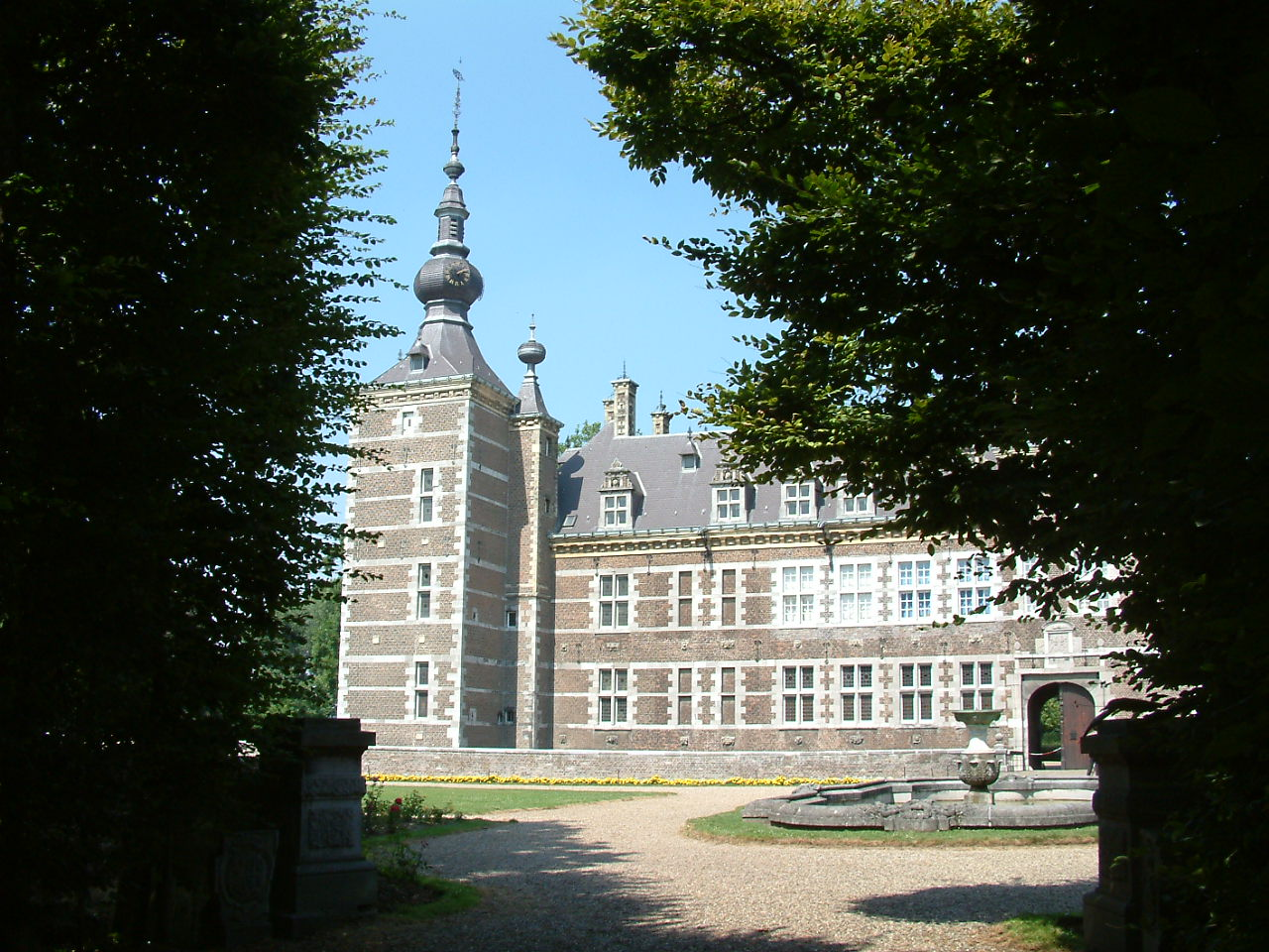 Description Kasteel Eijsden Date3-8-2003SourceOwn work by the original uploaderAuthorPivosPermission(Reusing this file) Licentie verstrekt door Pierre Vossen Kasteel Eijsden